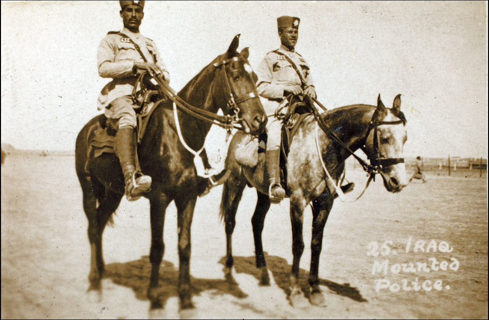 Iraq mounted police. خيالة الشرطة العراقية في بدايات القرن العشرين